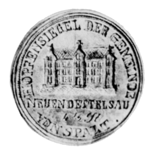 „Hopfensiegel der Gemeinde Neuendettelsau 4½ St[unden] von Spalt“ mit der Abbildung der 1864 errichteten „Blödenanstalt“.